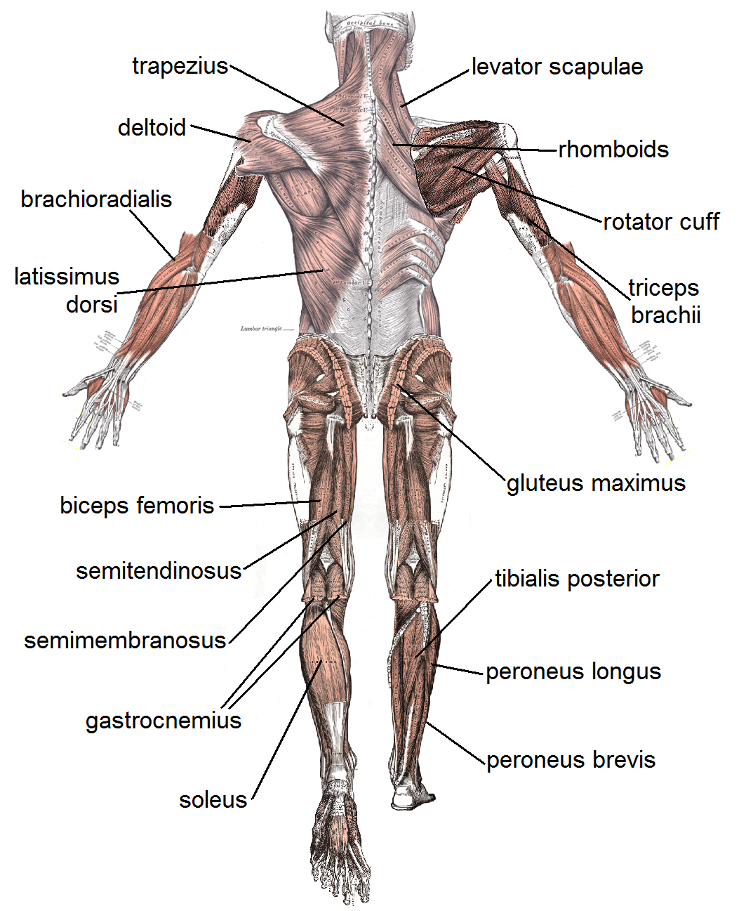 Collage of several of Gray's muscle pictures, by Mikael Häggström (User:Mikael Häggström)